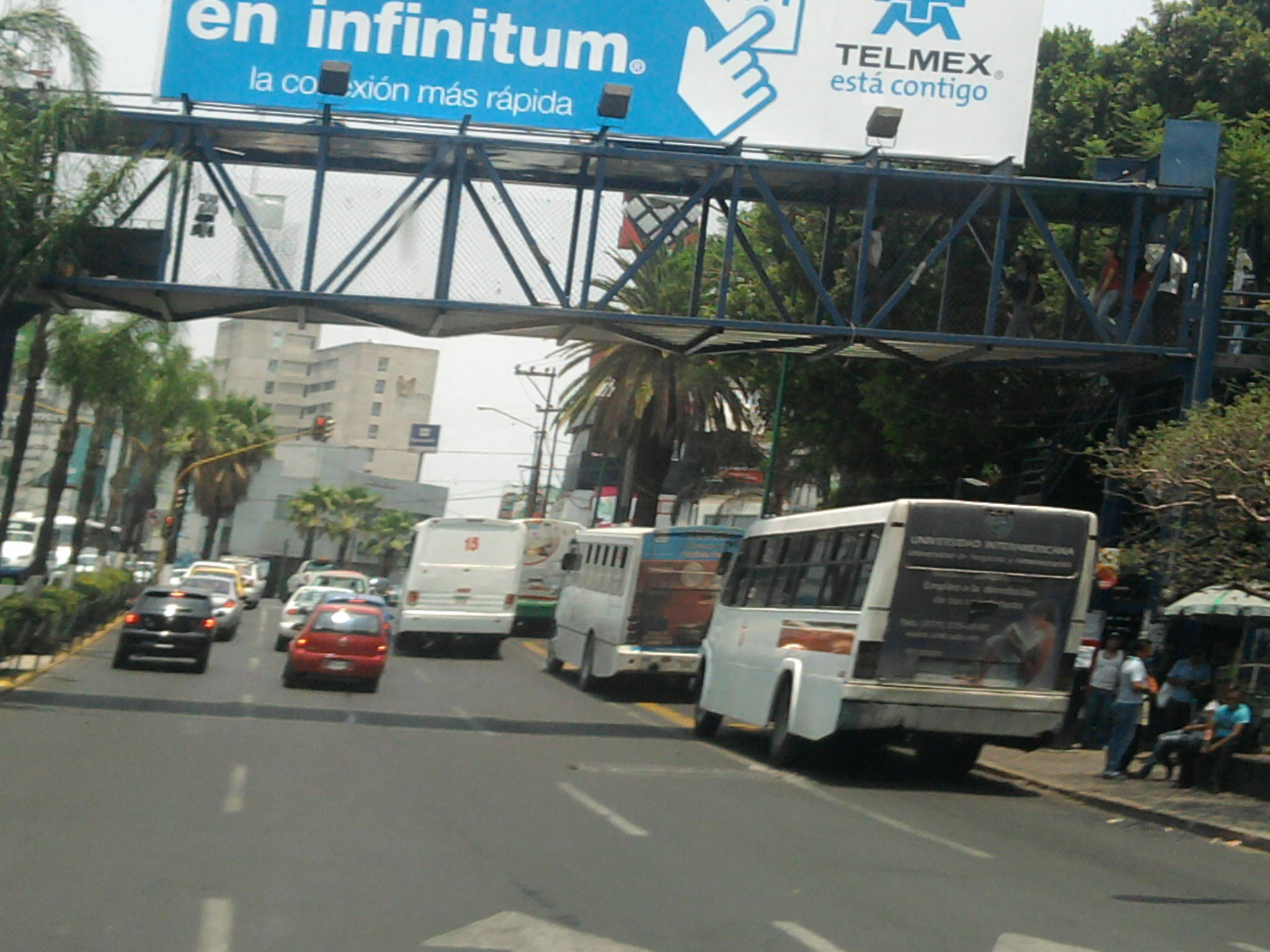 Avenida Plan de Ayala a la altura de la glorieta de la Luna